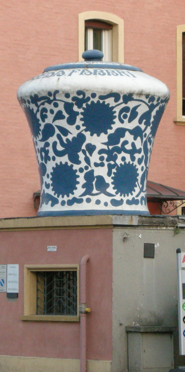 Borgo panigale, via emilia, manifattura fabbri